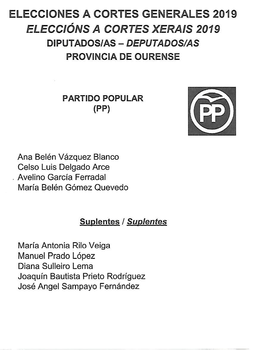 Eleccions Congreso de España 2019 Partido Popular Ourense